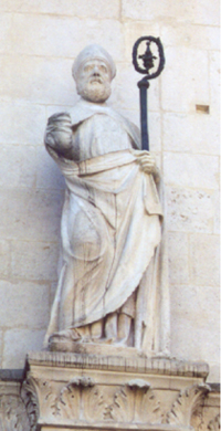 Statua di San Panfilo posta sulla facciata del Palazzo dell'Annunziata a Sulmona.